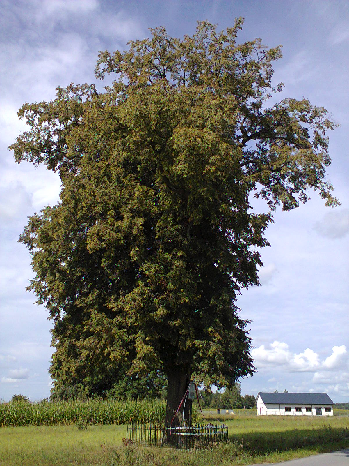 Lipa - pomnik przyrody w Łączkach (powiat ostrołęcki)